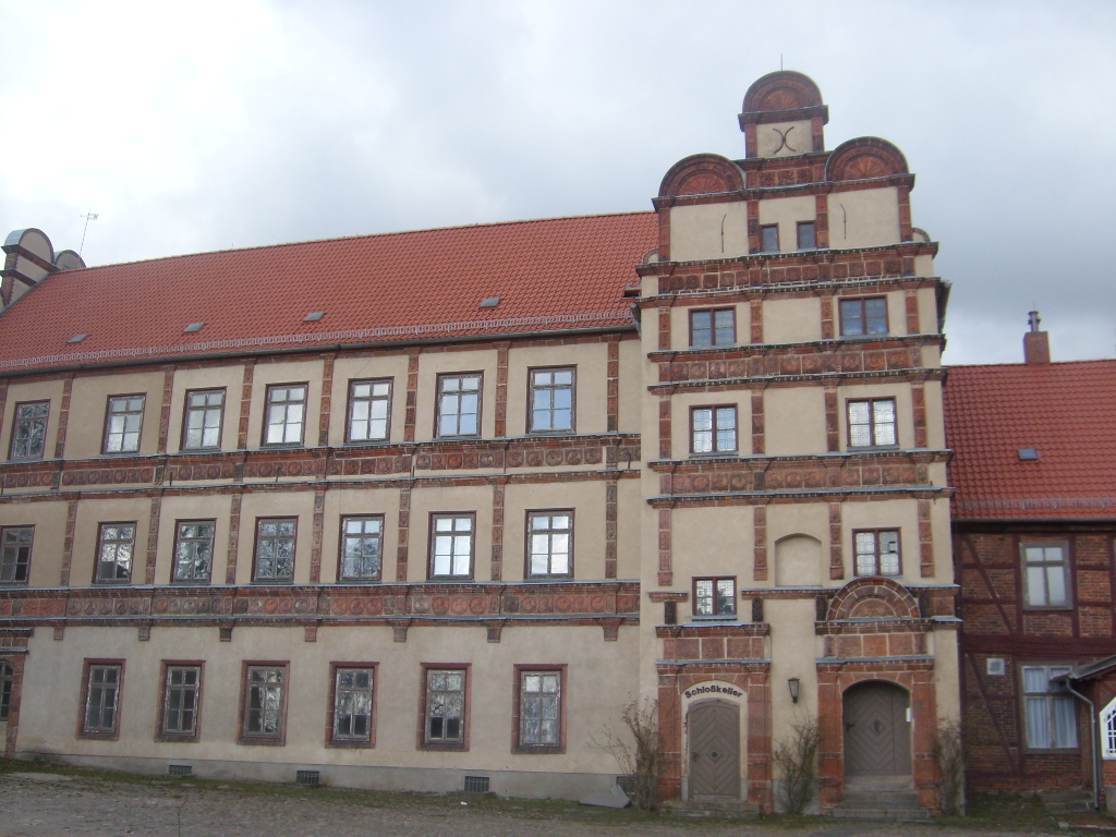 Schloss Gadebusch von der Südseite (Innenhof) mit Fassadenschmuck von Statius vonDüren.